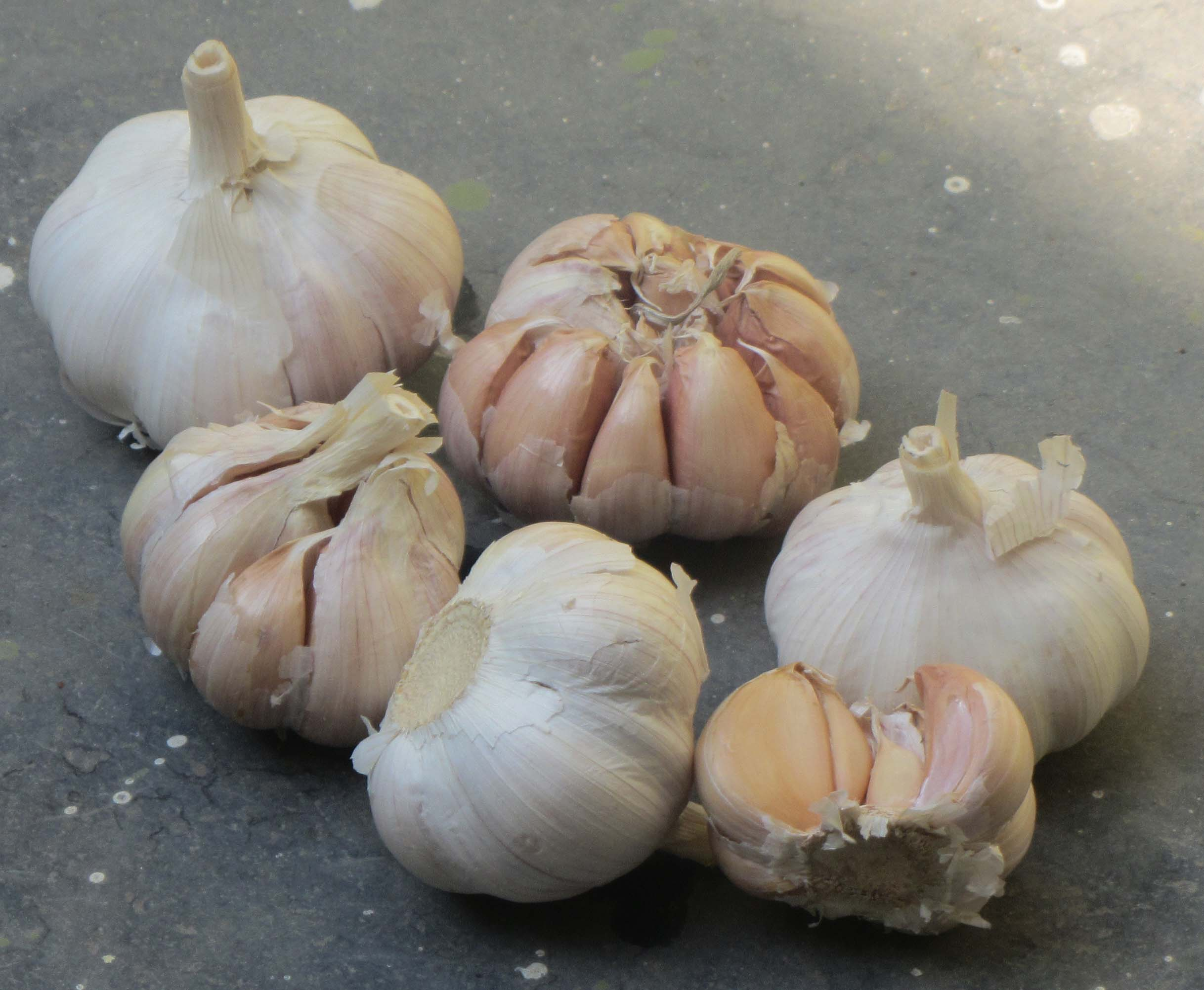 பூண்டு என்னும் வெள்ளை-வெங்காயம். own shot.